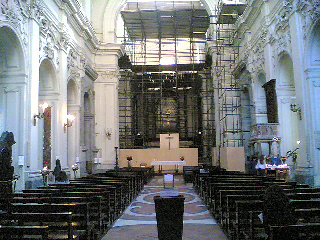 Interno, Martire, Napoli